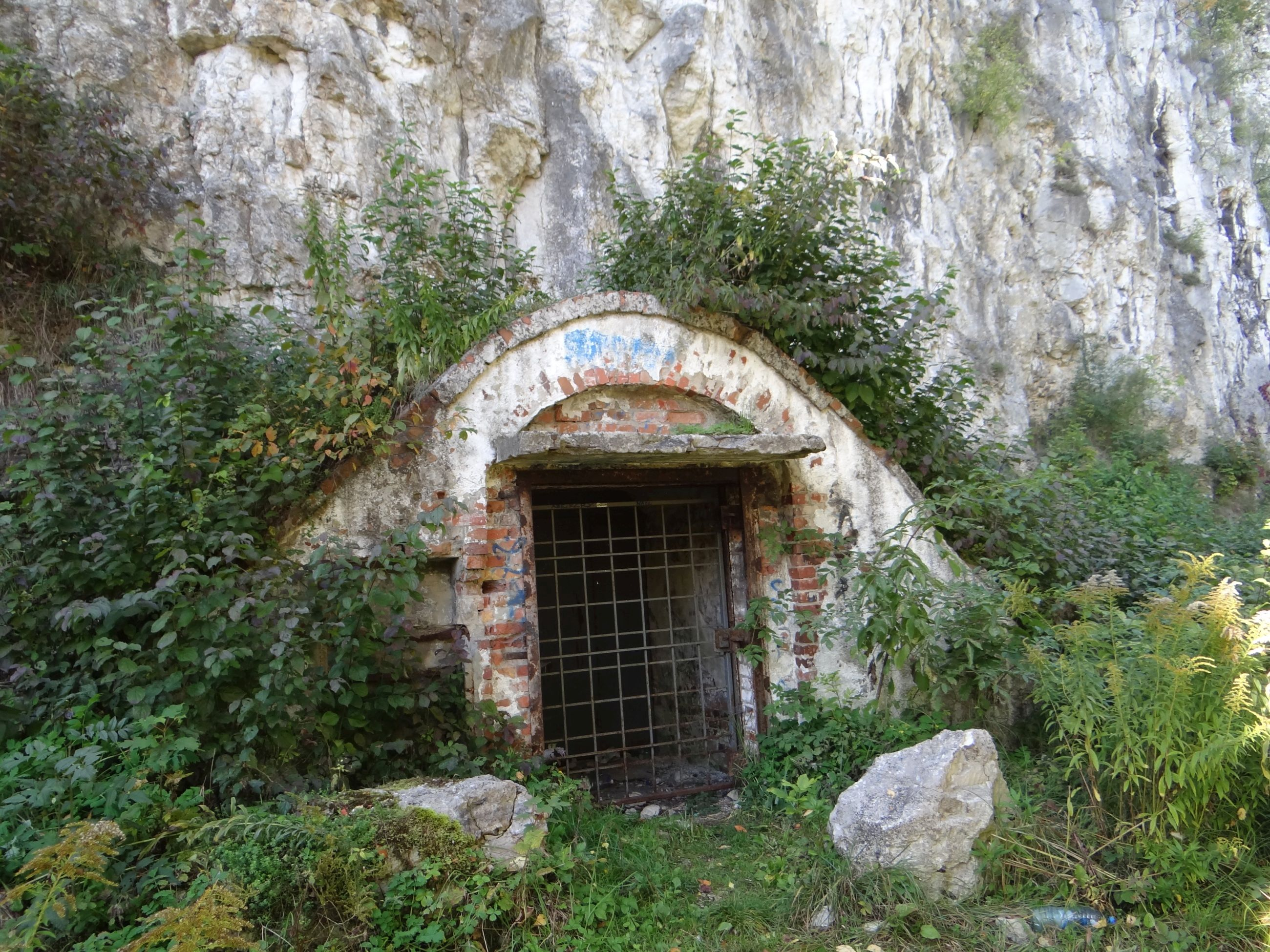 Kawerna w murze Rdzawe Zacięcie na Zakrzówku w Krakowie